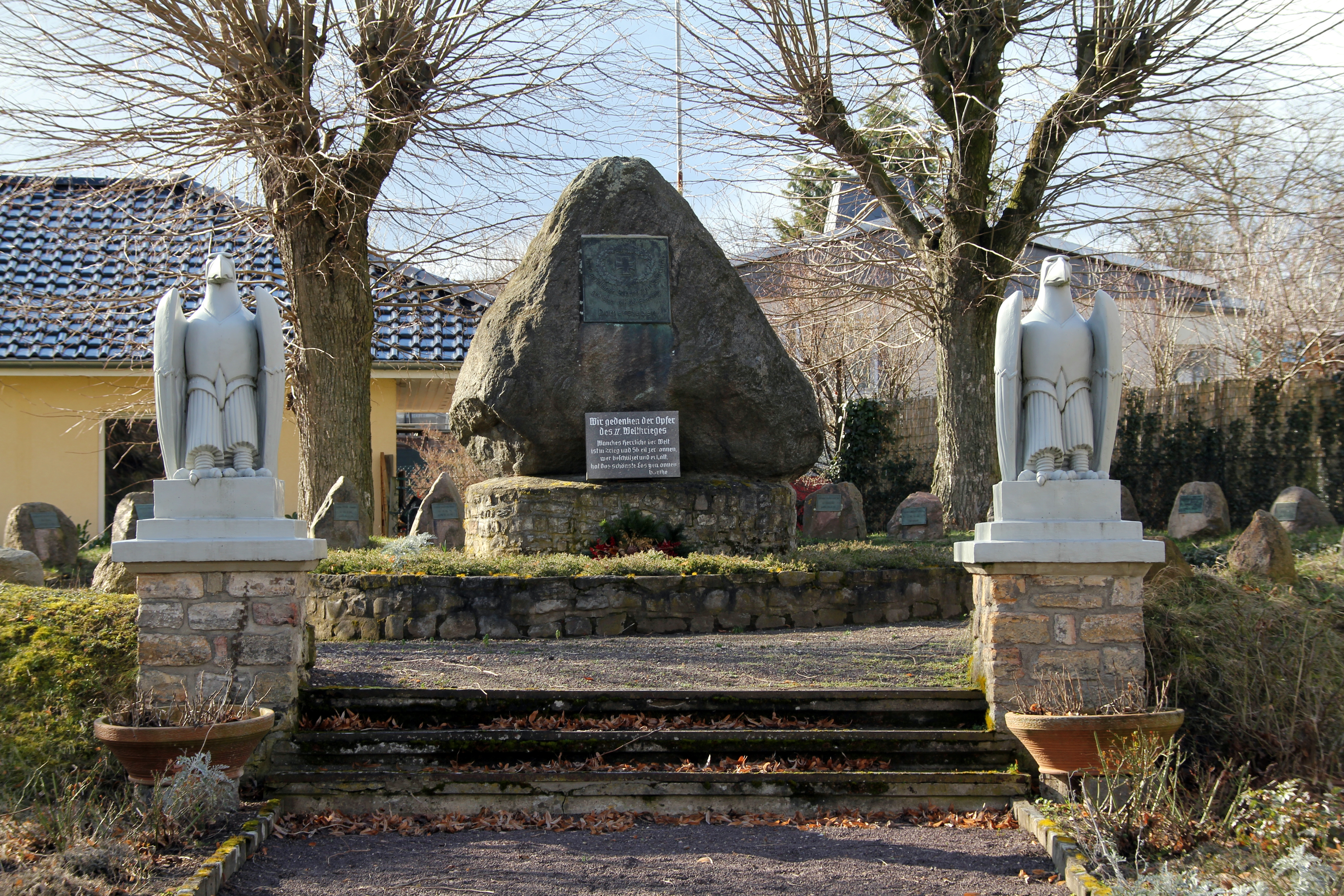 Kriegerdenkmal Heinrich-Mann-Straße Ecke Hermsdorfer Weg Domersleben